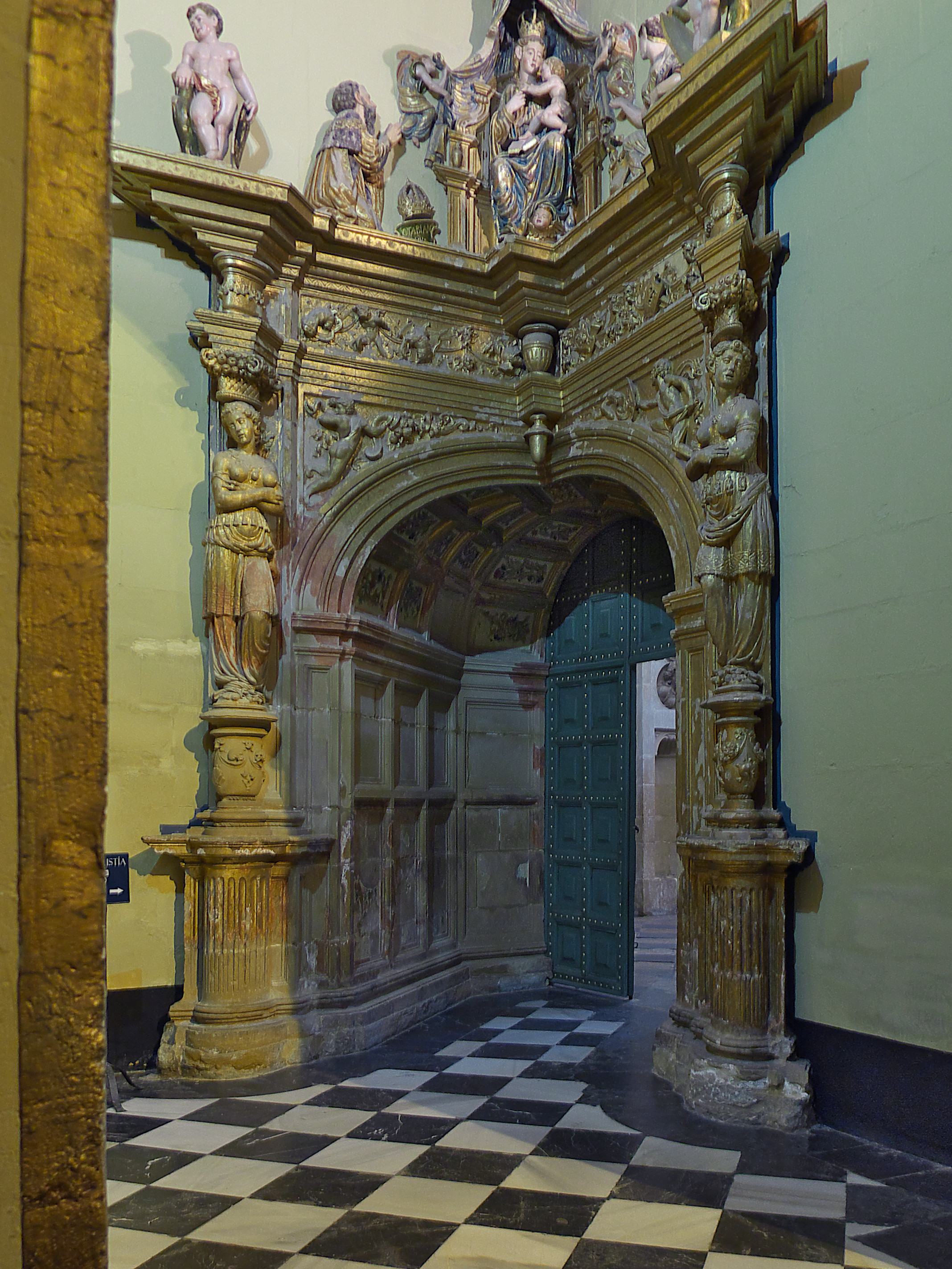 Andrés de Vandelvira proyecta la definitiva sacristía en un espacio oblicuo a la capilla mayor (1540). La solución con puerta en esviaje o puerta en esquina y rincón, demuestra el alto grado de conocimiento arquitectónico, por parte de Vandelvira, sobre estereotomía.